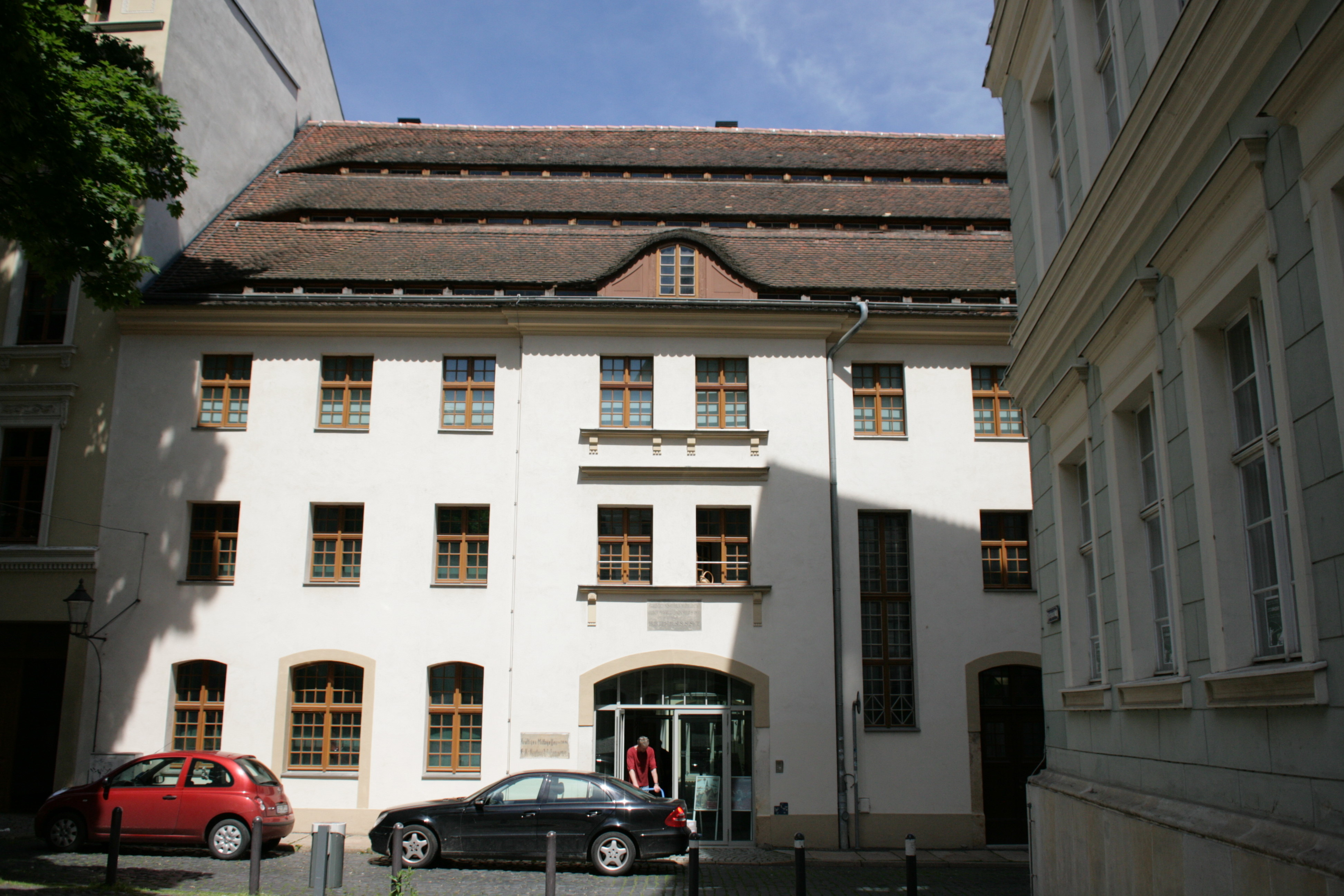 Fischmarkt in Görlitz